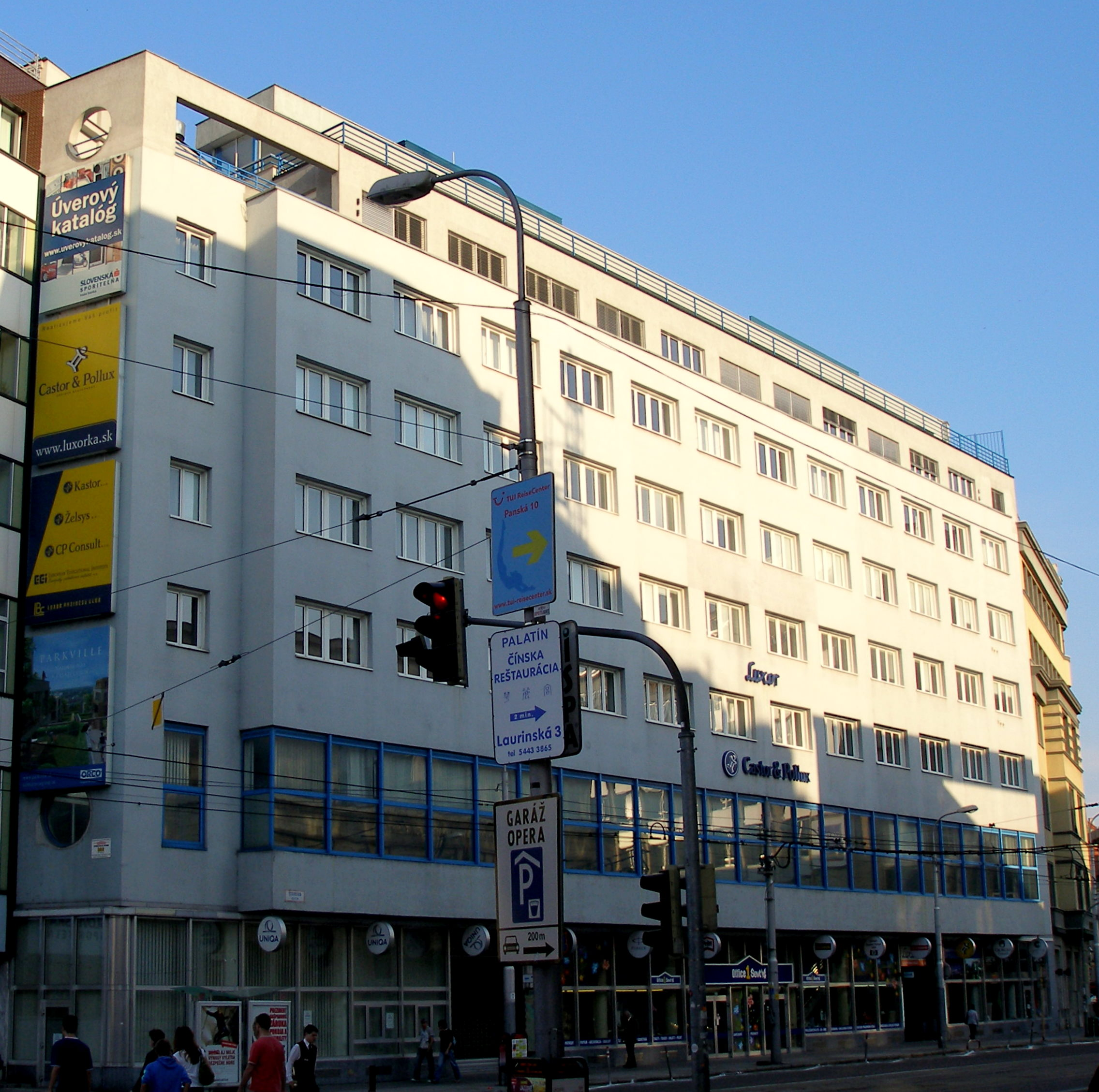 Stavebný komplex Luxor ulica Štúrova v Bratislave na veľkonočný Veľký piatok 2009.